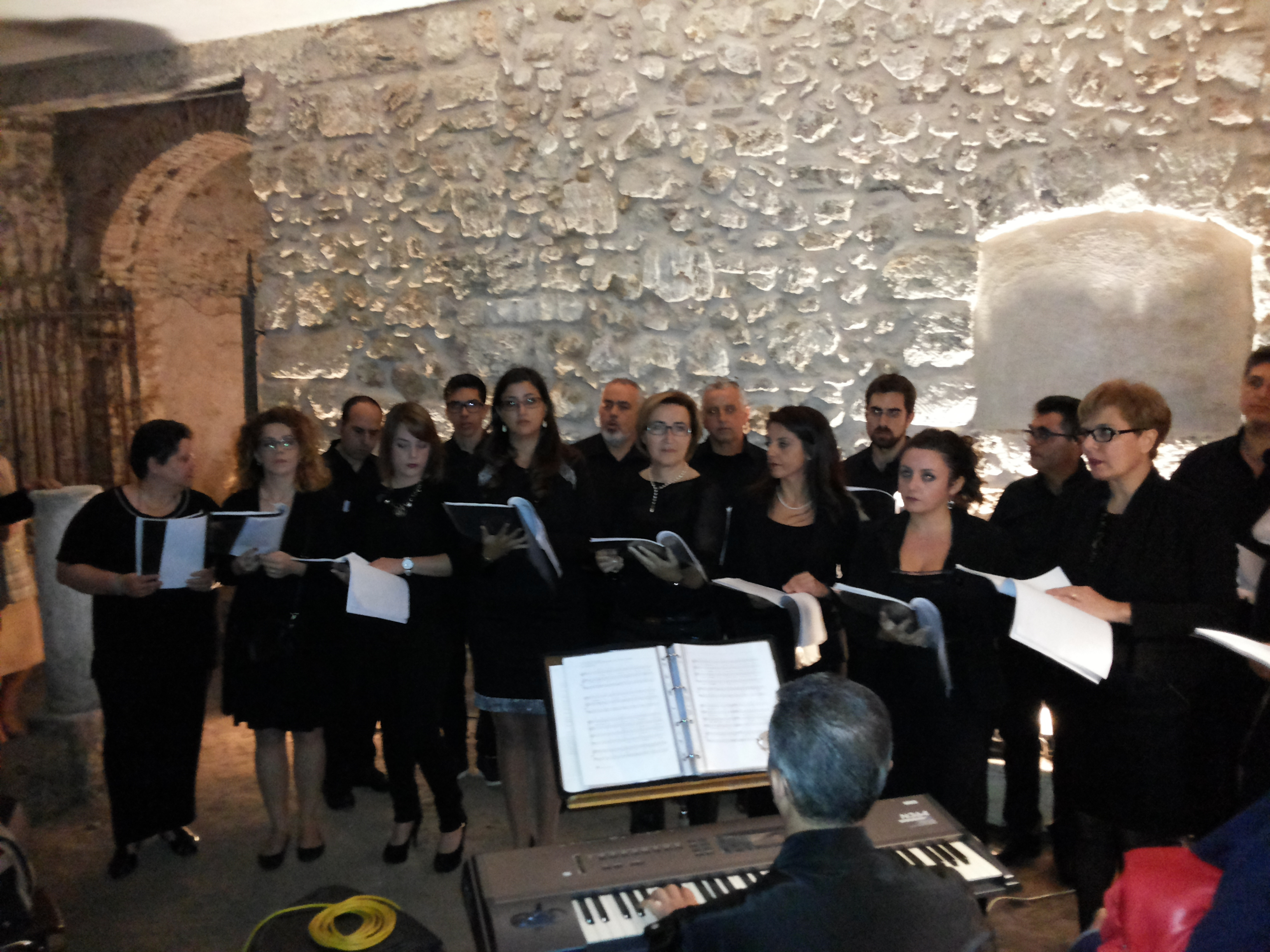 Coro "Mater Dei" ad Alcamo. Esibizione canora all'interno del giardino di Palazzo Rocca.